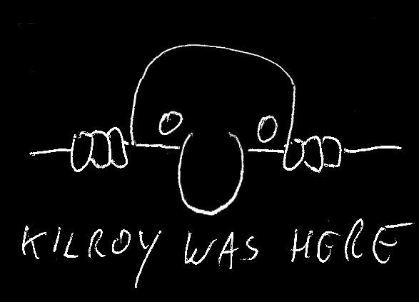 edited version of kilroy_black